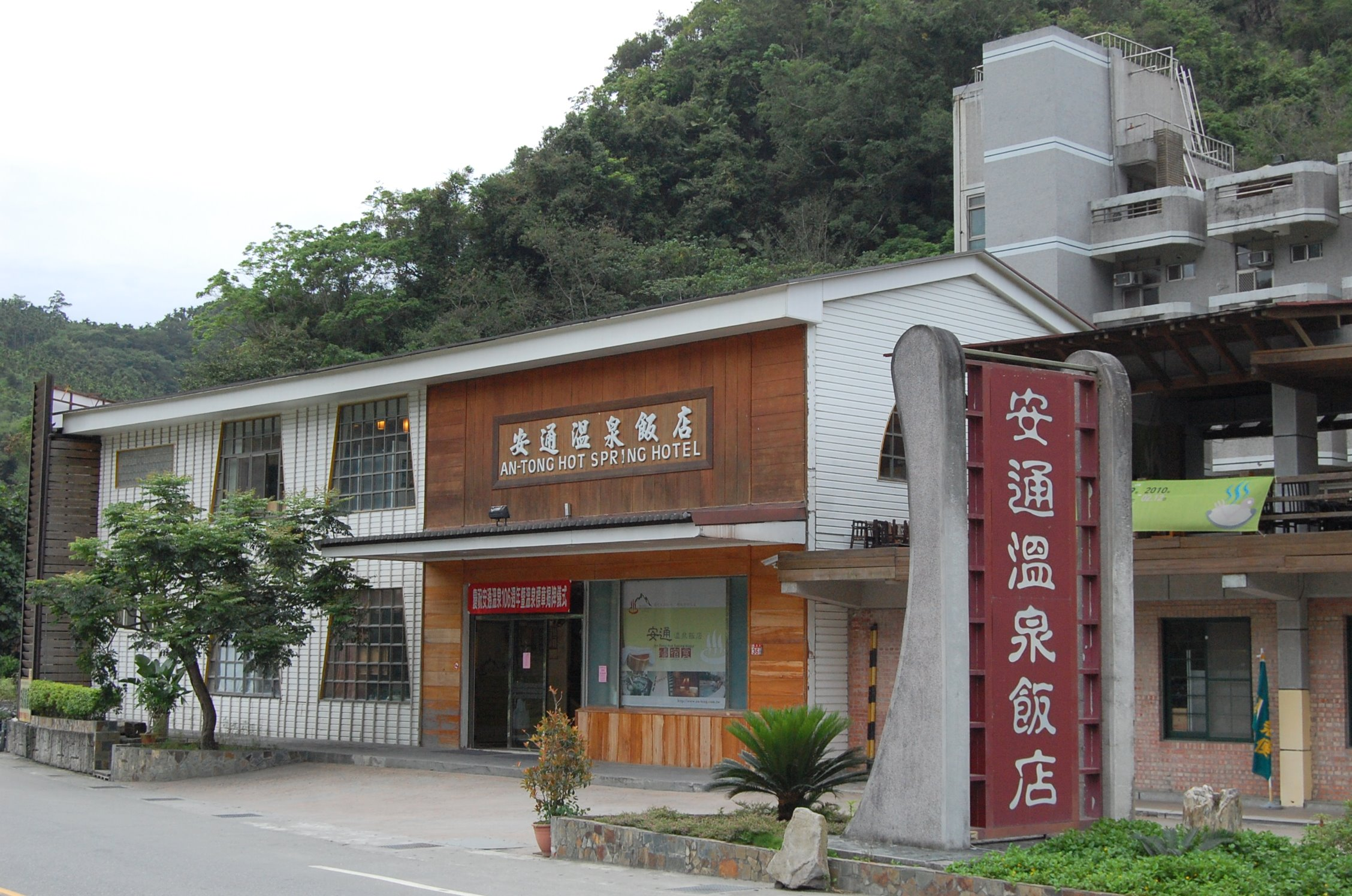 安通溫泉飯店，地址：花蓮縣玉里鎮溫泉36號。